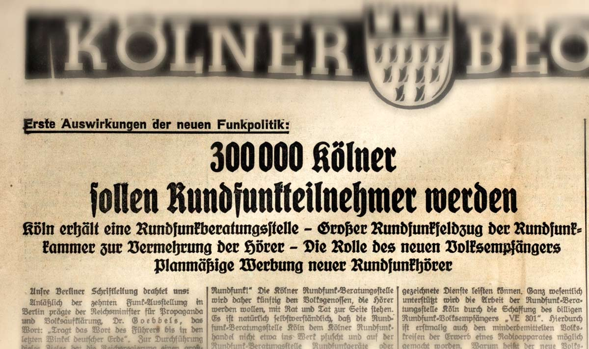 Ausschnitt aus der NSDAP-Zeitung Westdeutscher Beobachter vom 23. August 1933: "300.000 Kölner sollen Rundfunkteilnehmer werden". Zur aktuellen Nazi-Rundfunkpolitik